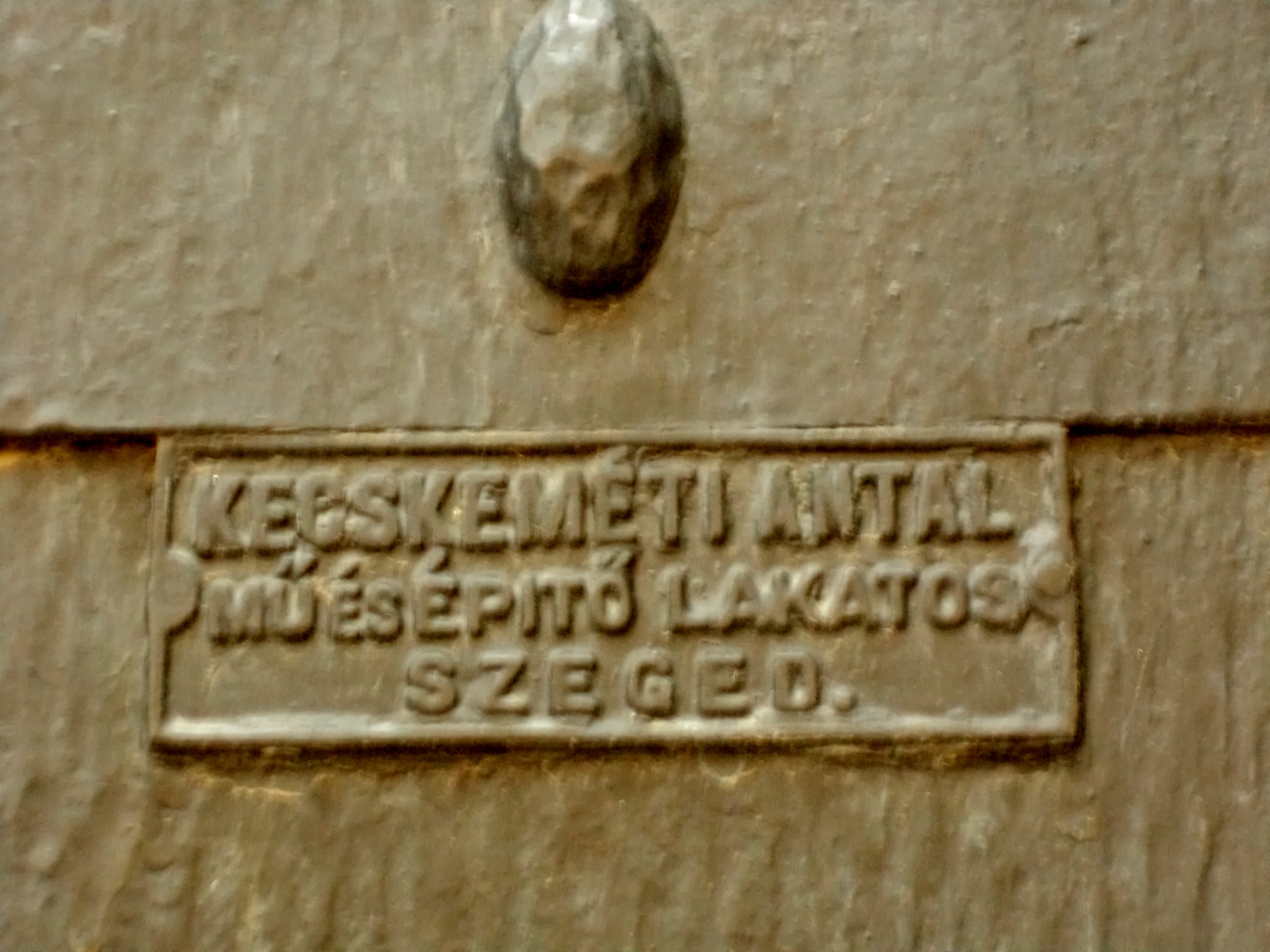 Kapu kovácsoltvasból, részletek